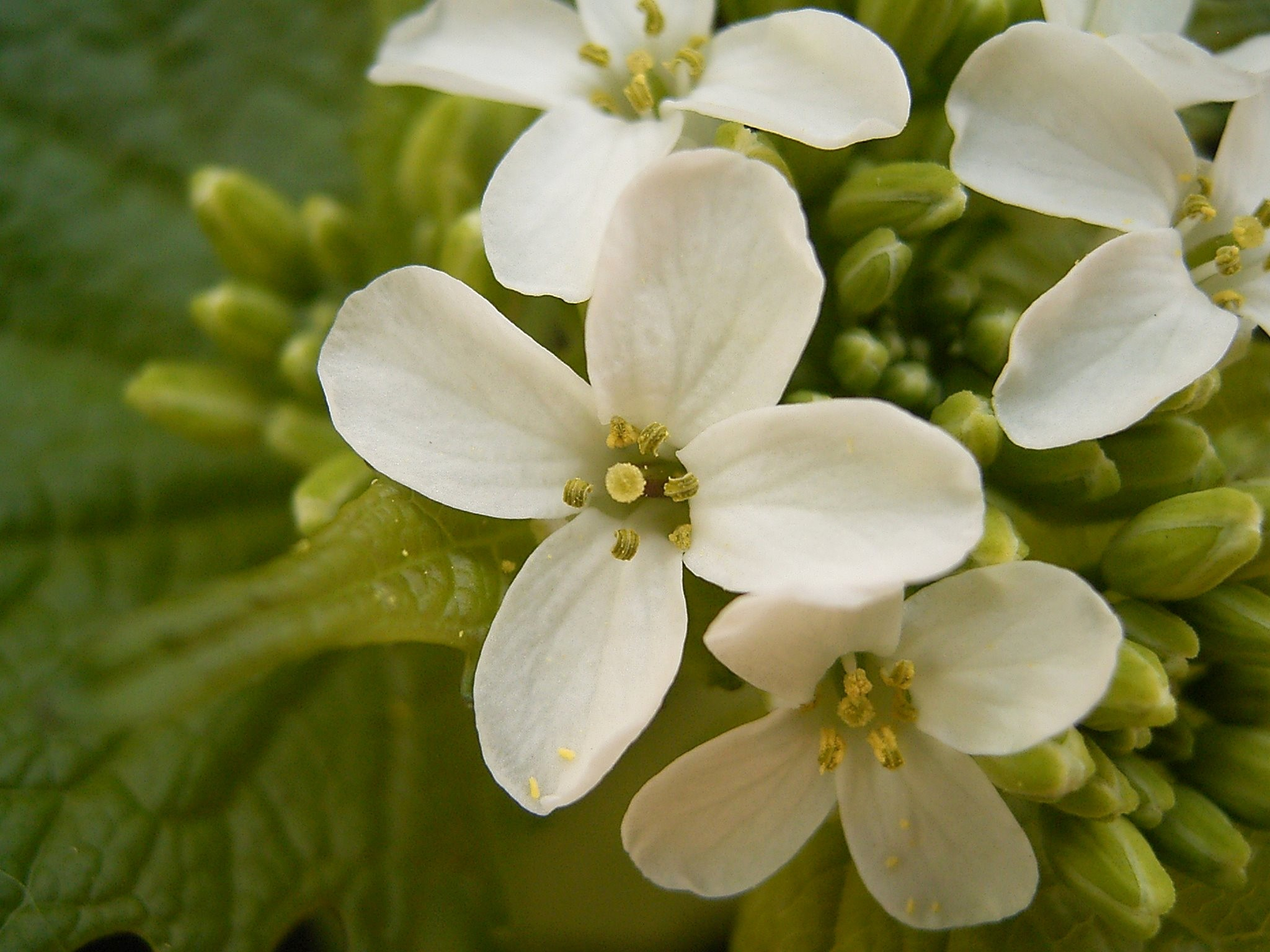 Alliaria petiolata